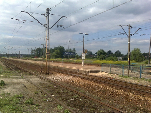 Stacja PKP Garwolin